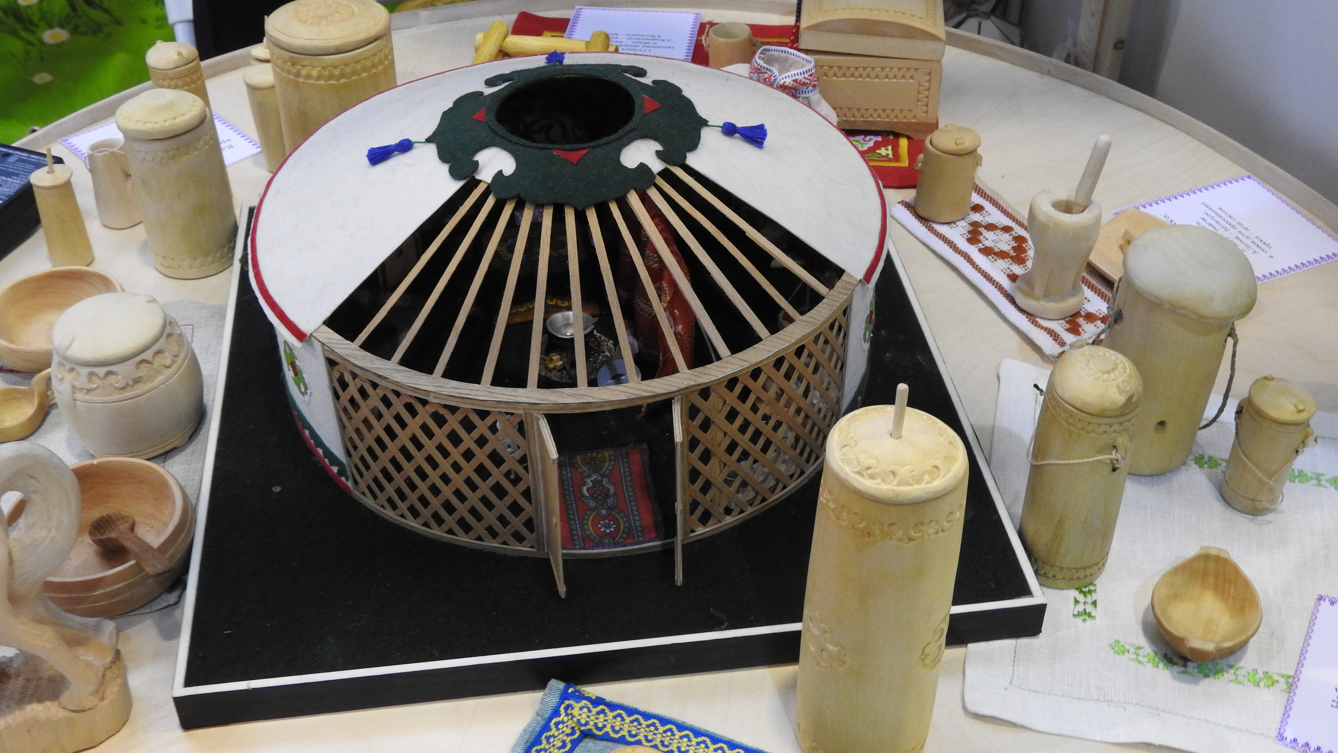 Выставка на ВДНХ ЭКСПО "УФА-ЛАДЬЯ. АРТ.РЕМЕСЛА. СУВЕНИРЫ", Уфа.